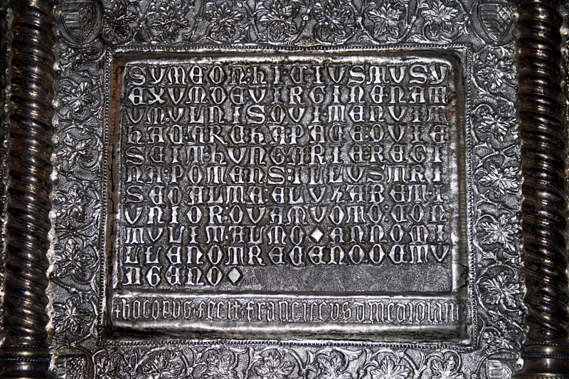 Svečano proglašenje i predstavljanje novih članova Hrvatske akademije znanosti i umjetnosti u Zagrebu